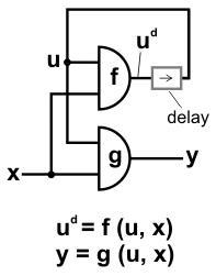 Allgemeines Asynchron-Schaltwerk auf Logikentwurfsebene gezeichnet